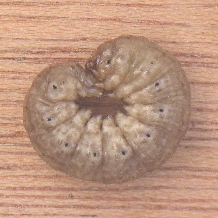 (nl: Aardrups van Grote worteluil) Agrotis ipsilon